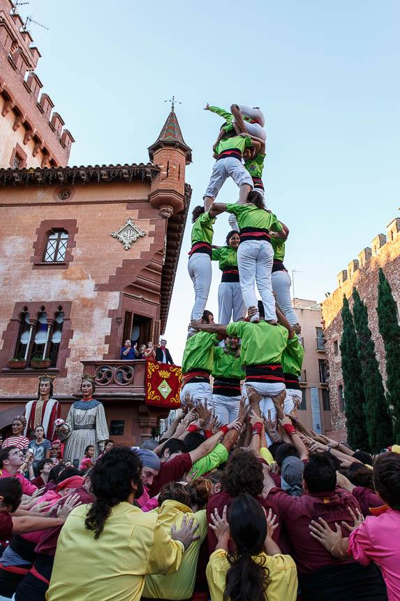 4d6 al Bateig dels Castellers de Viladecans. 5 d'Octube de 2013